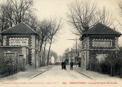 Carte postale (de plus de 70 ans) représentant les pavillons de garde des Pavillons-Sous-Bois. Licensing Catégorie:Les Pavillons-sous-Bois